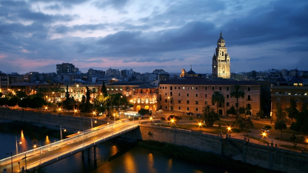 Vista de Murcia por la noche desde el rio segura